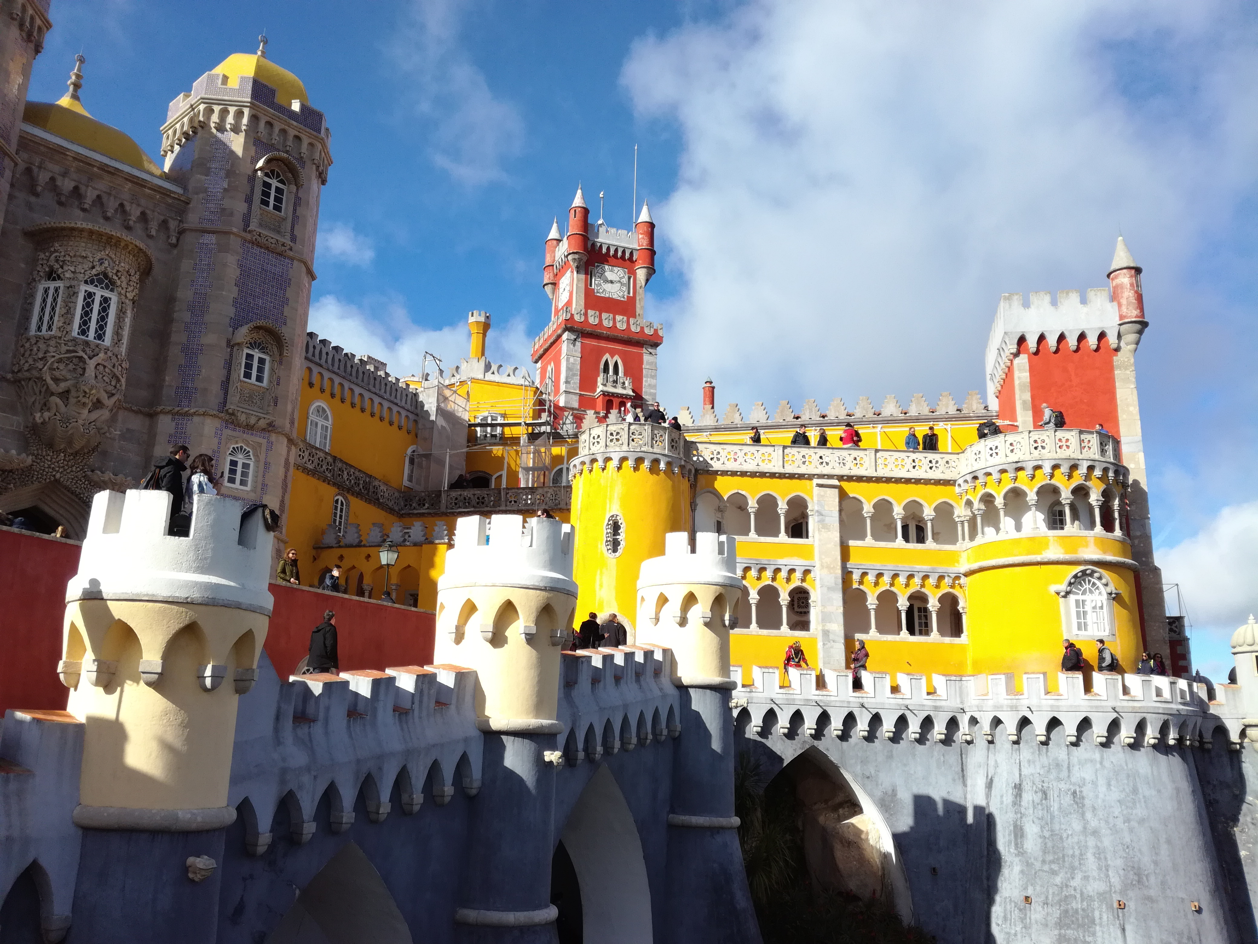 Palais National de Pena